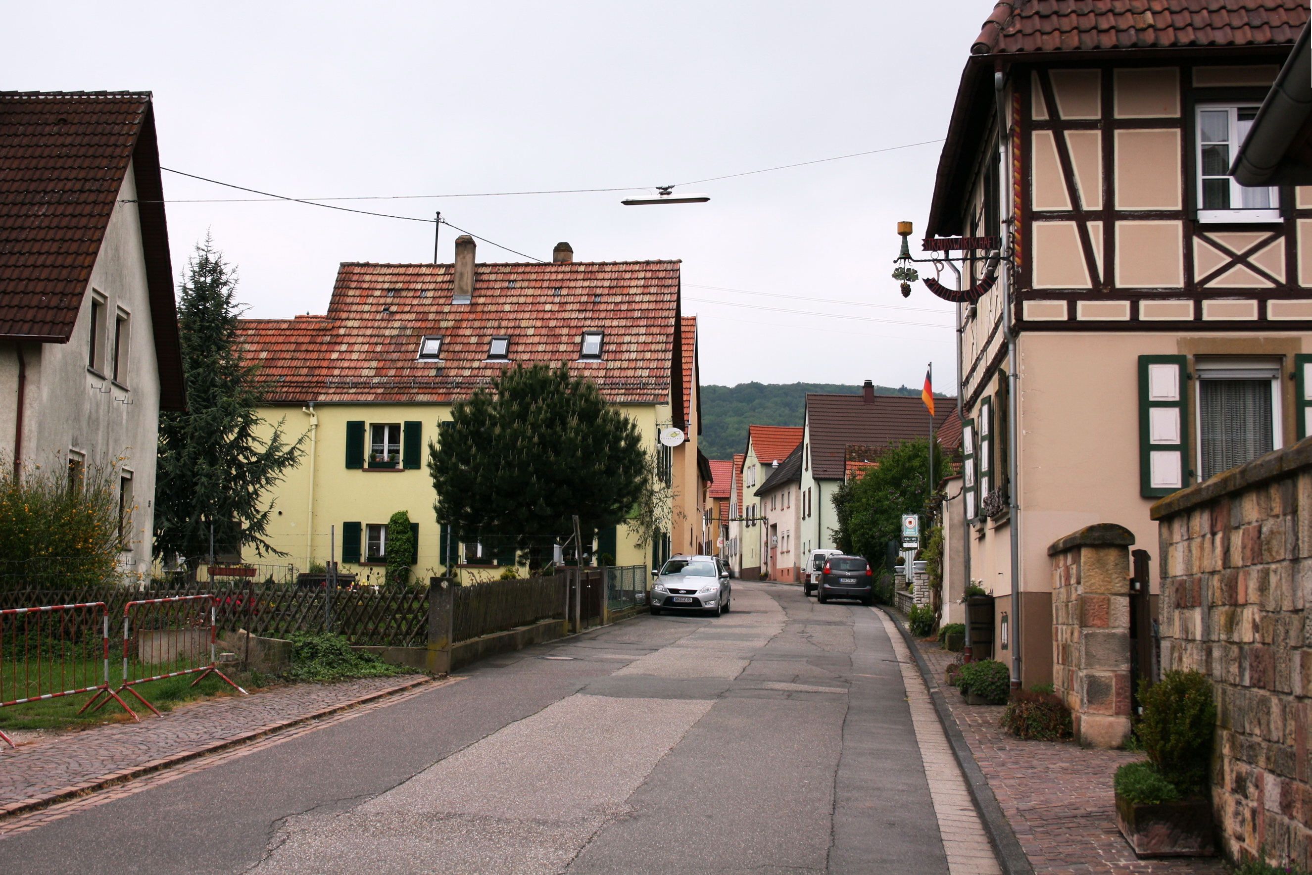 Straße in Schweigen-Rechtenbach mit einem Fachwerkhaus. Schweigen-Rechtenbach ist eine Ortsgemeinde im Landkreis Südliche Weinstraße in Rheinland-Pfalz.